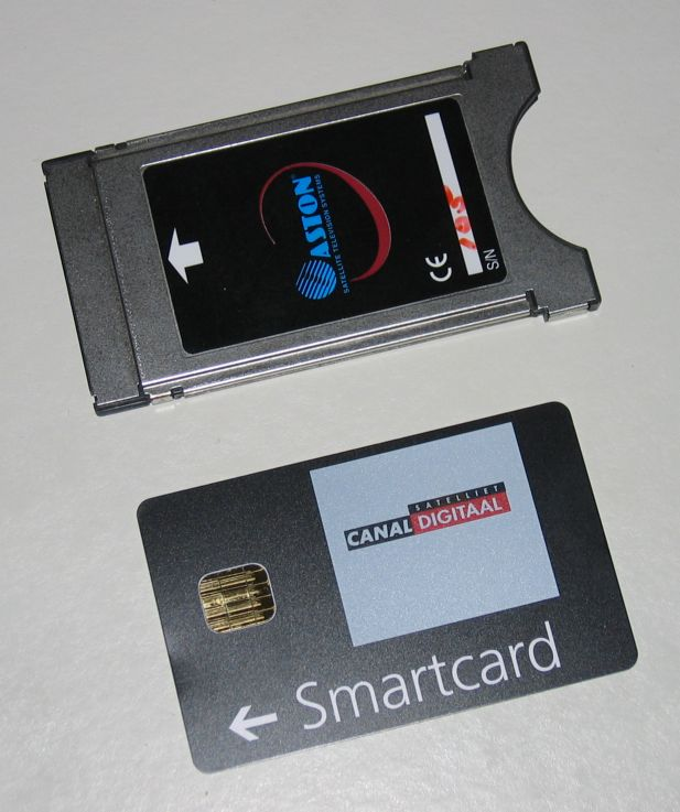 Foto van smartcard en CAM